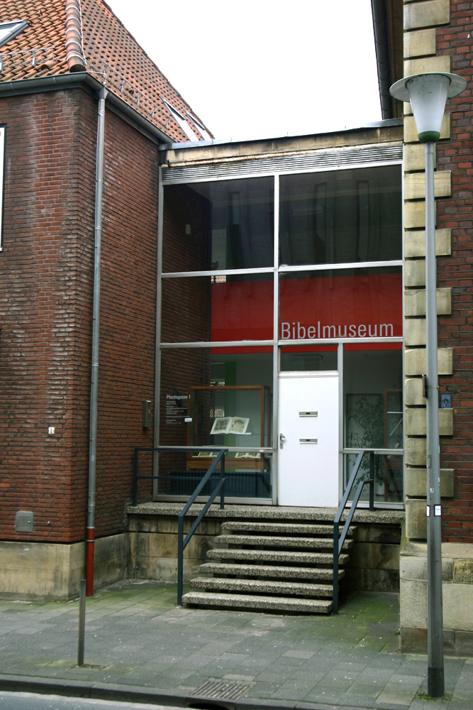 das Bibelmuseum im westfälischen Münster